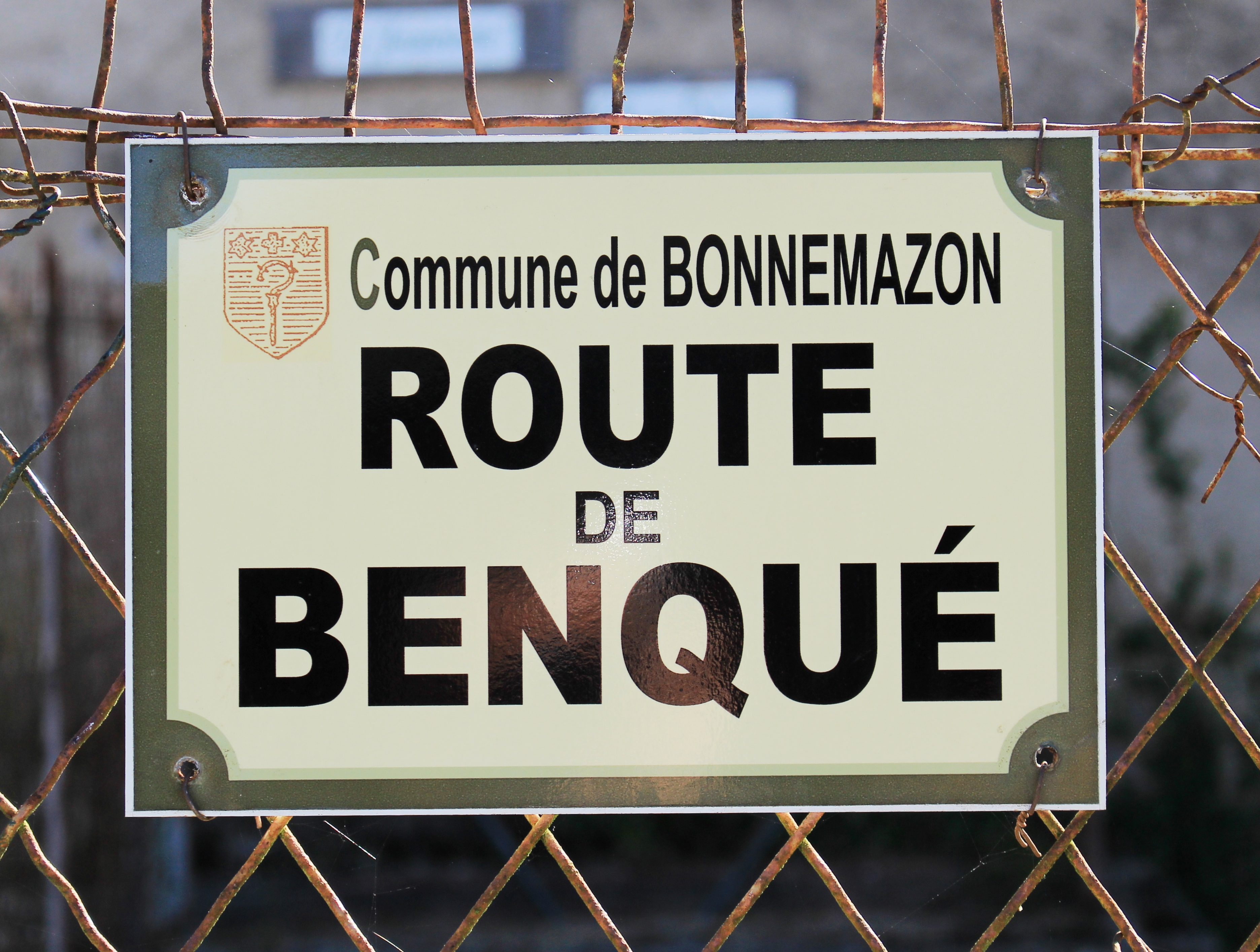 Rue du village de Bonnemazon (Hautes-Pyrénées)